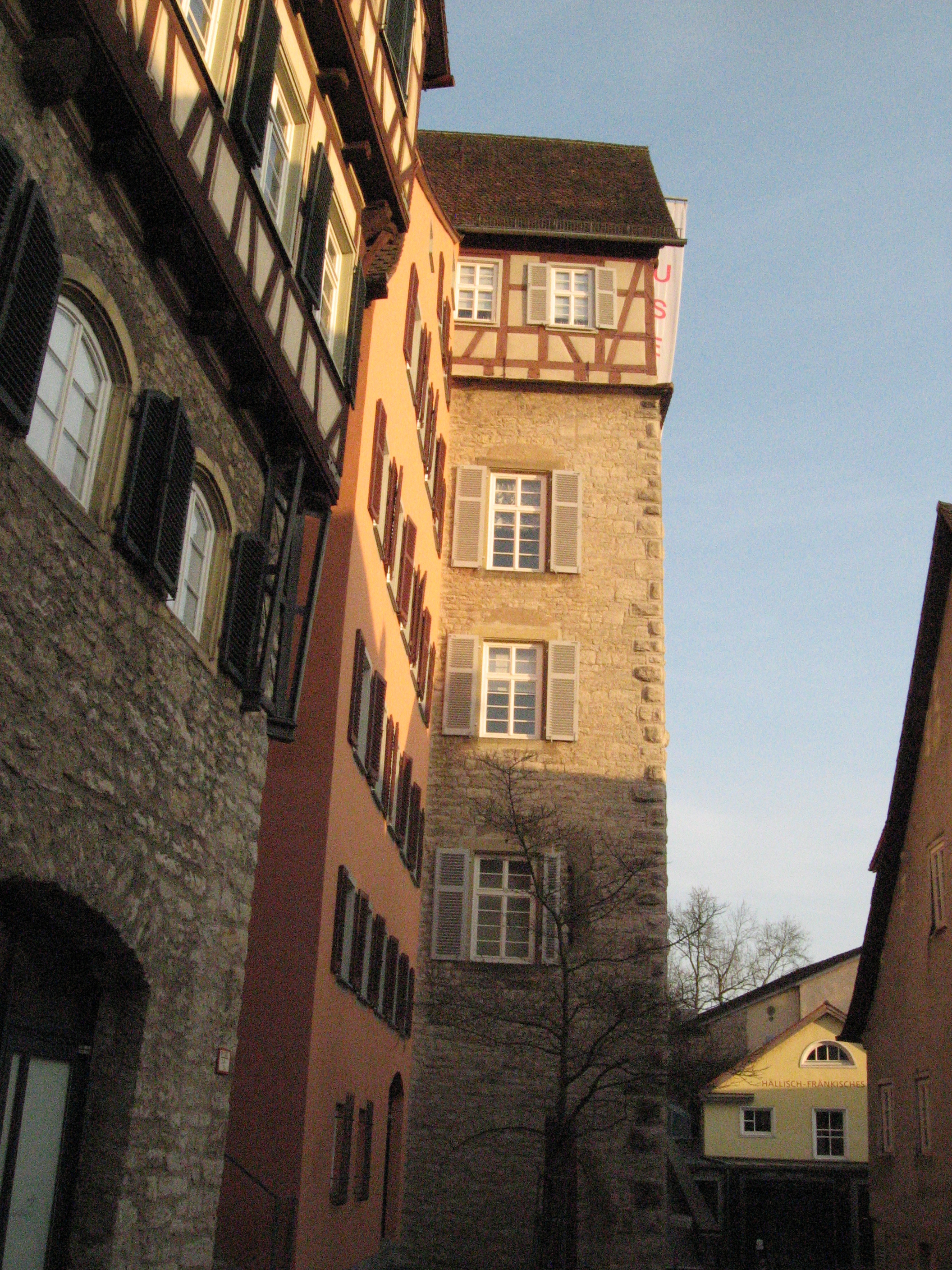 Blick nach SSE auf die hoch aufragende sogenannte Keckenburg im Keckenhof der Schwäbisch Haller Altstadt. Auf einer Informationstafel am Gebäude steht: Untere Herrengasse 10 Ein Turmhaus wie in der Toskana Im Mittelalter war die „Keckenburg“ Wohnhaus, Adelssitz und Befestigung zugleich. Um 1240 enstanden, erhielt sie 1515 ihren Fachwerkaufsatz. Noch heute tragen im Innern die ersten Hölzer aus dem 13. Jahrhundert die Geschossdecken. Die „Keckenburg“, nach der früher hier wohnenden Familie „Keck“ benannt, beherbergt jetzt Teile des Hällisch-Fränkischen Museums.